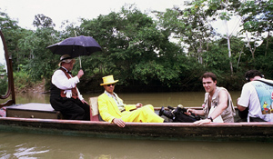 Kid Créole